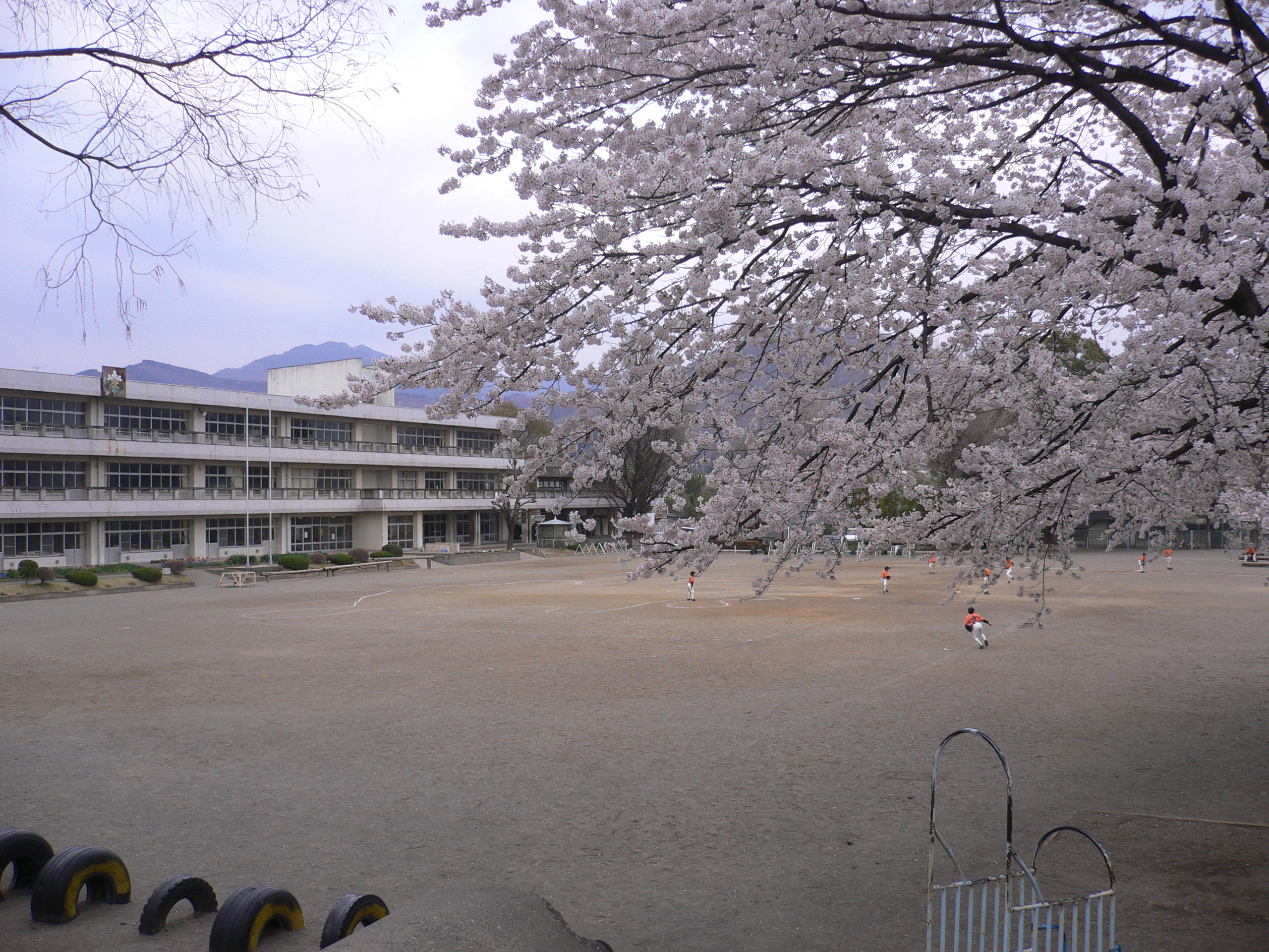 Kiryu（市立北小学校）